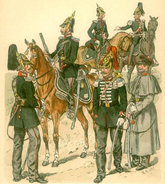 Knötel, Band XVI, Tafel 17: Großherzoglich Hessisches Garde-Chevaulegers Regiment 1850